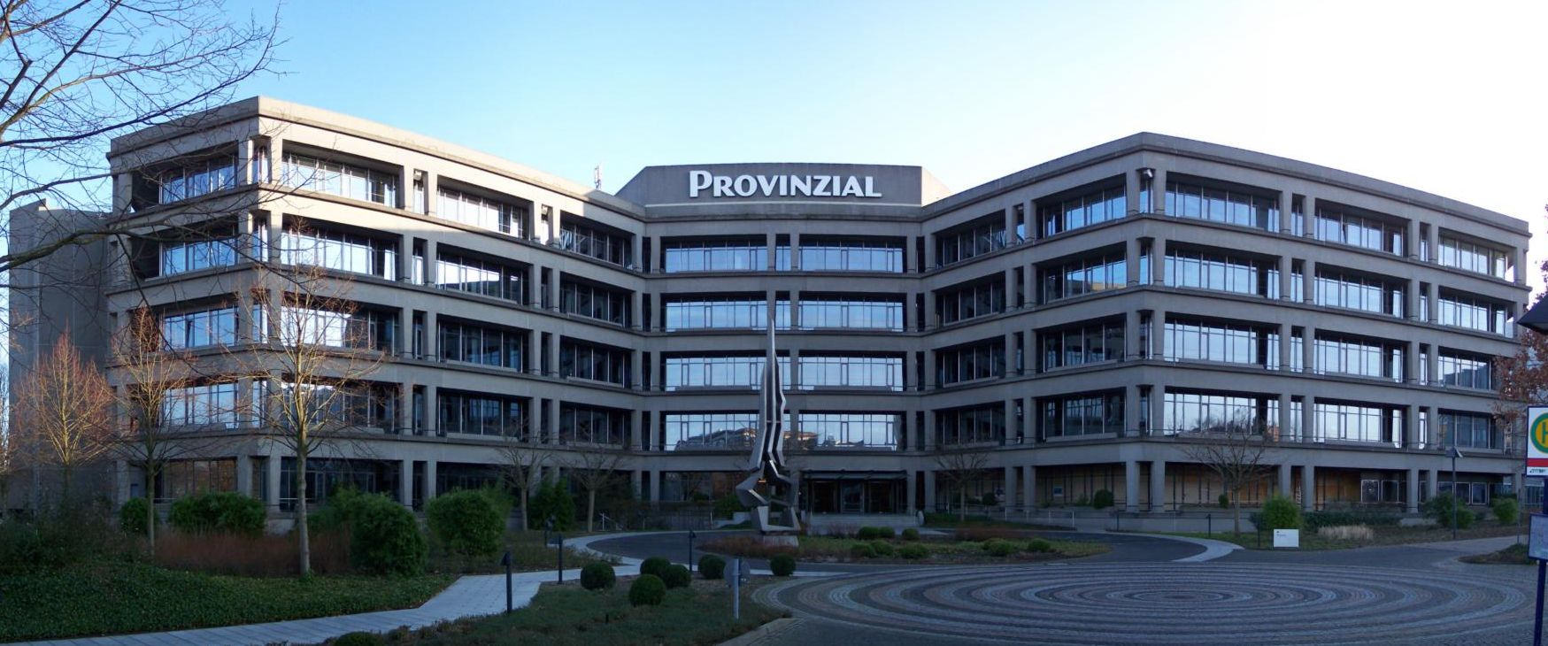 Verwaltungsgebäude der Westfälischen Provinzial in Münster (Westfalen)